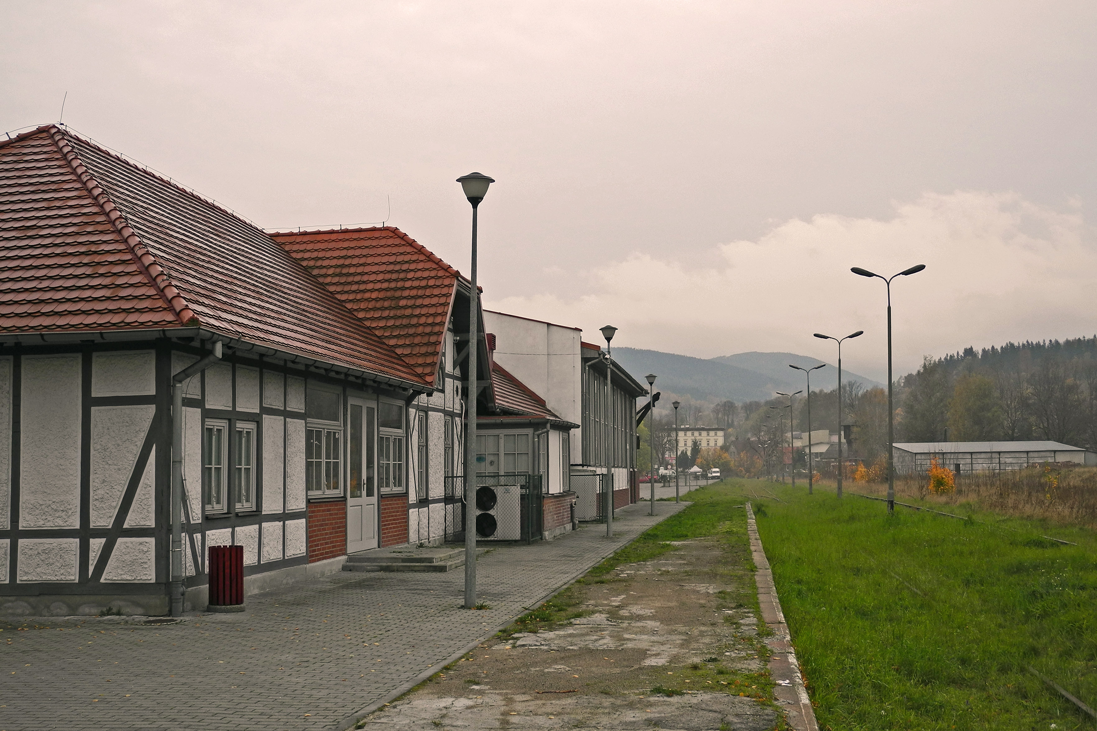 Ehem. Bahnhof in Seitenberg (Stronie Śląskie) im Glatzer Bergland, jetzt umgebaut zum Touristen- und Kulturzentrum